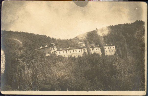 Света Богородица Пречиста